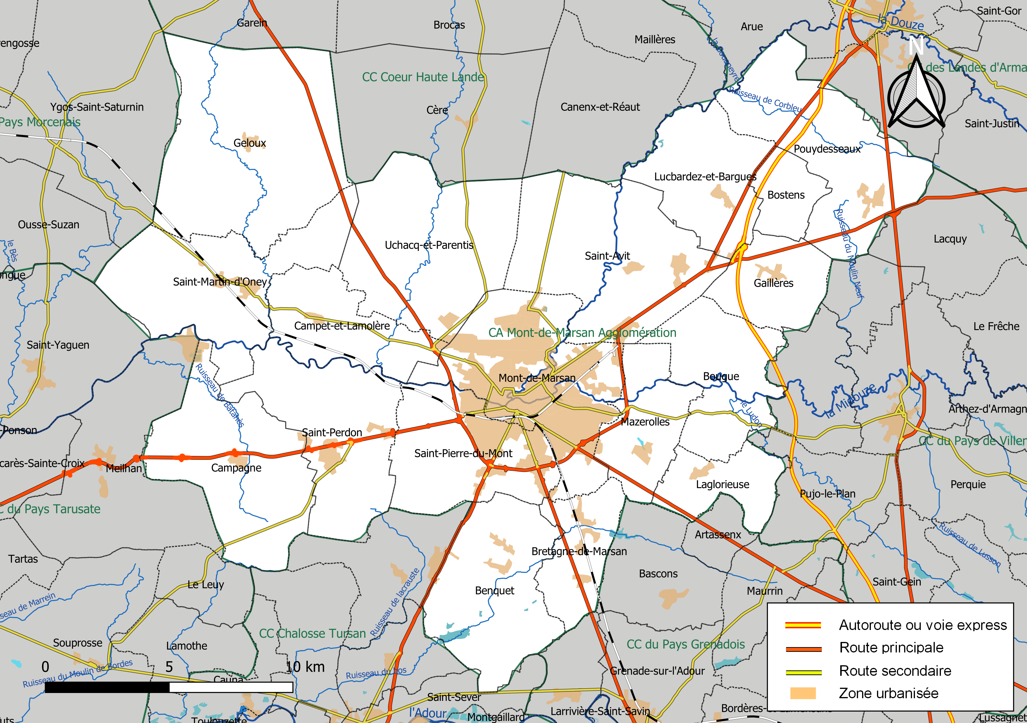 Carte géographique de l'intercommunalité Le Marsan agglomération, département des Landes, France. Composition au 1er janvier 2019.